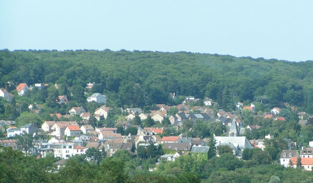 Description: ville de Bièvres. Source: photo prise par Christophe Jacquet le fr:25 juillet fr:2004. © Christophe Jacquet, 2004.